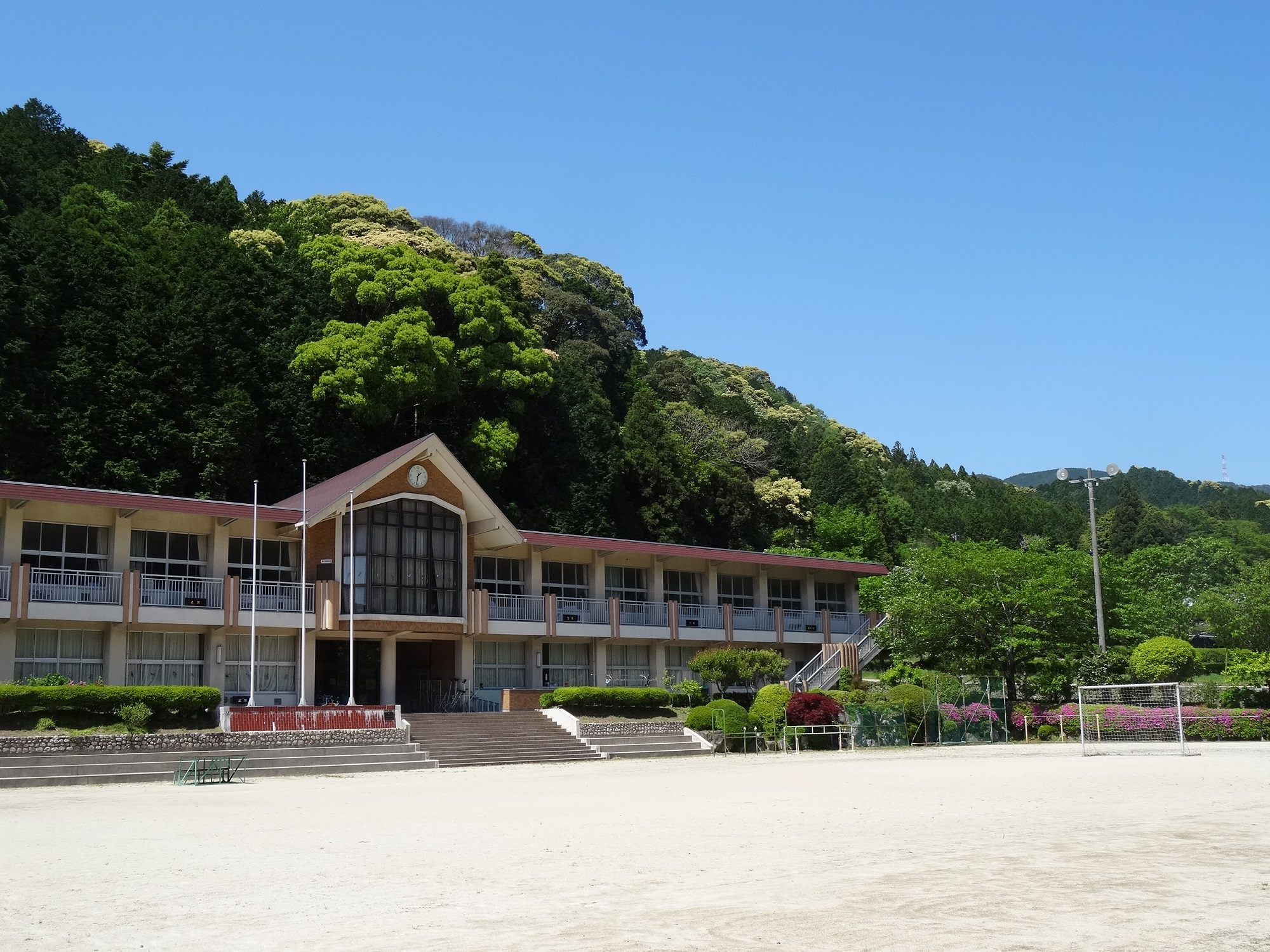 岡崎市立宮崎小学校